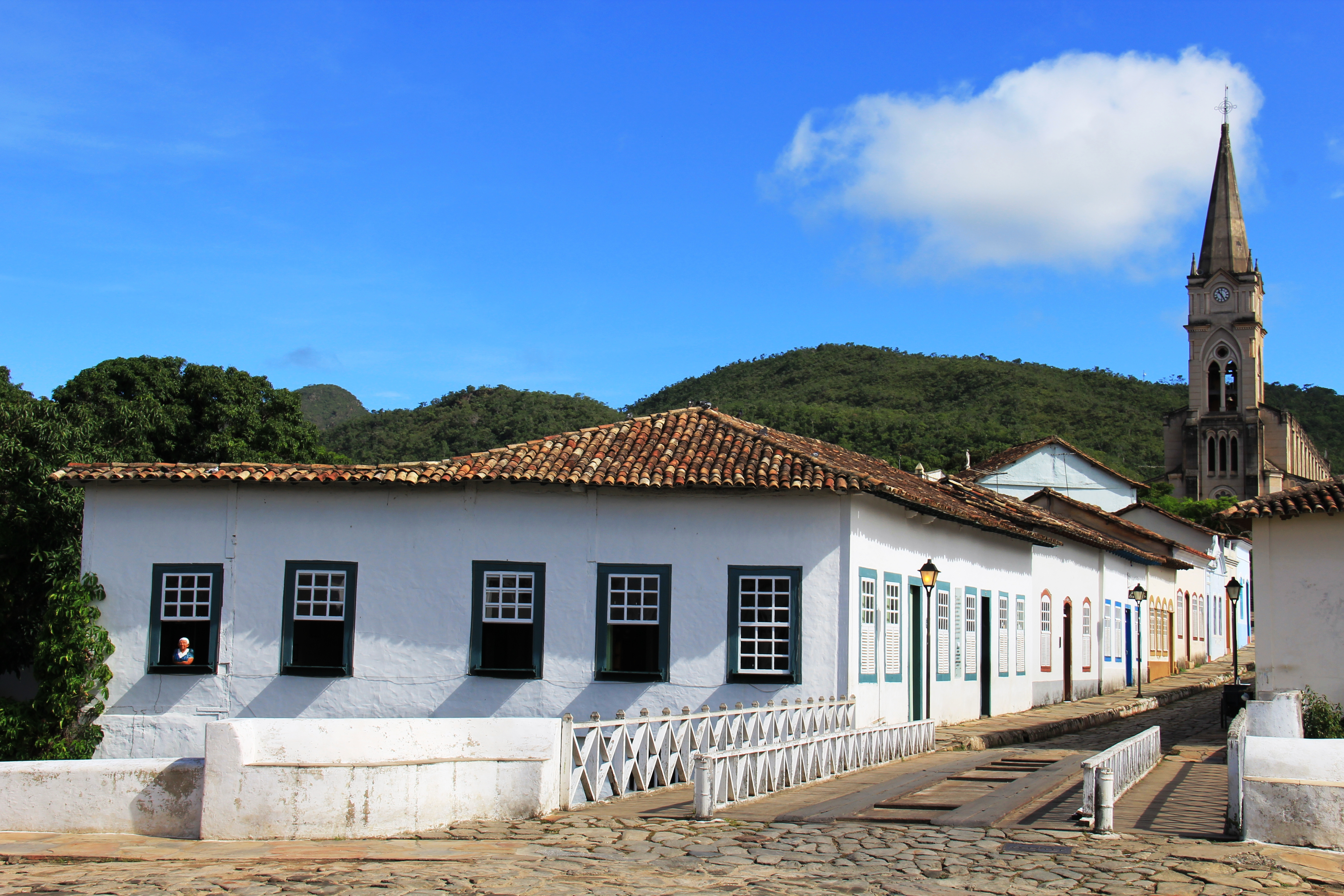 Goiás, GO: conjunto arquitetônico e urbanístico